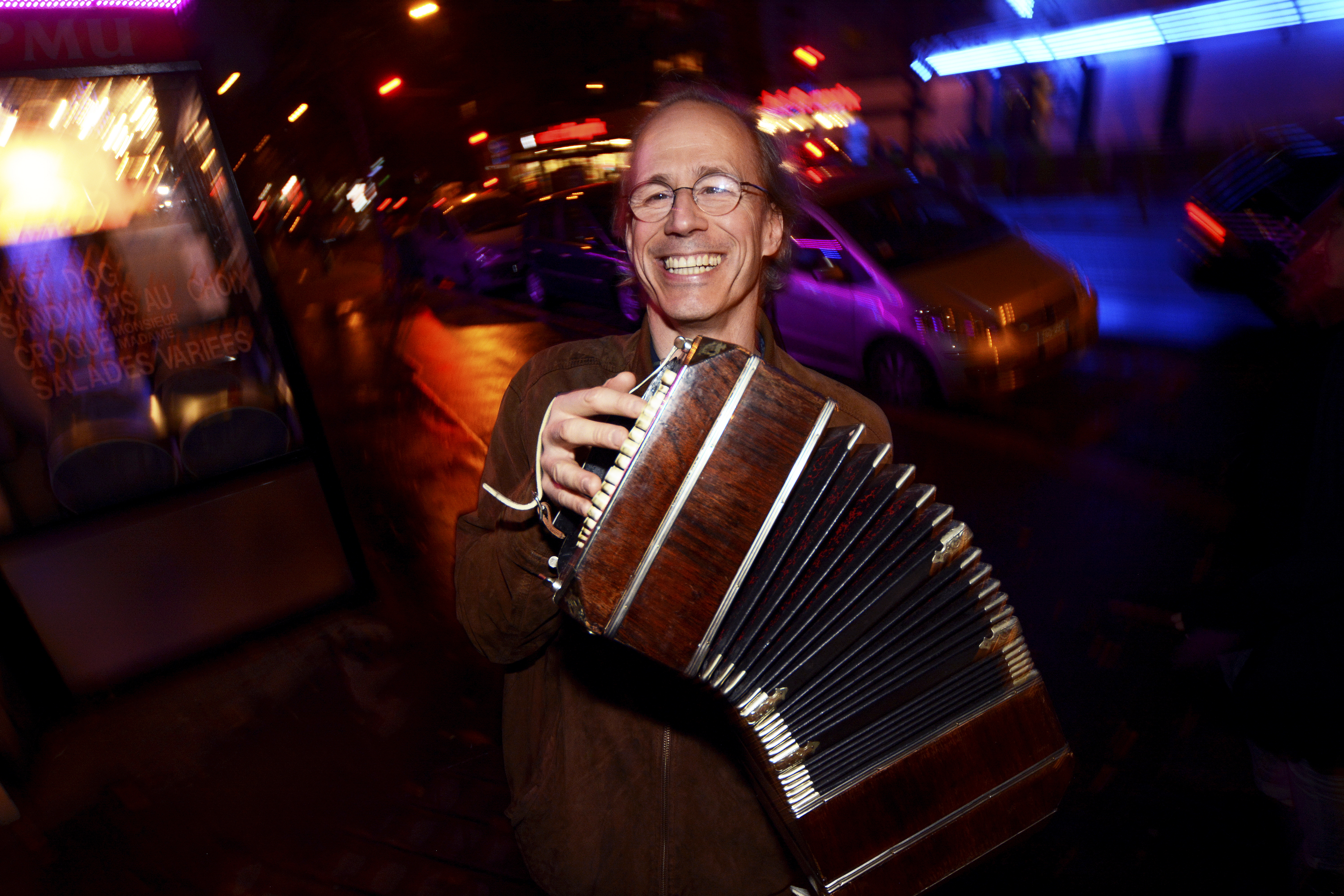 Per Arne Glorvigen, Paris 2015 foto Kari Utgaard